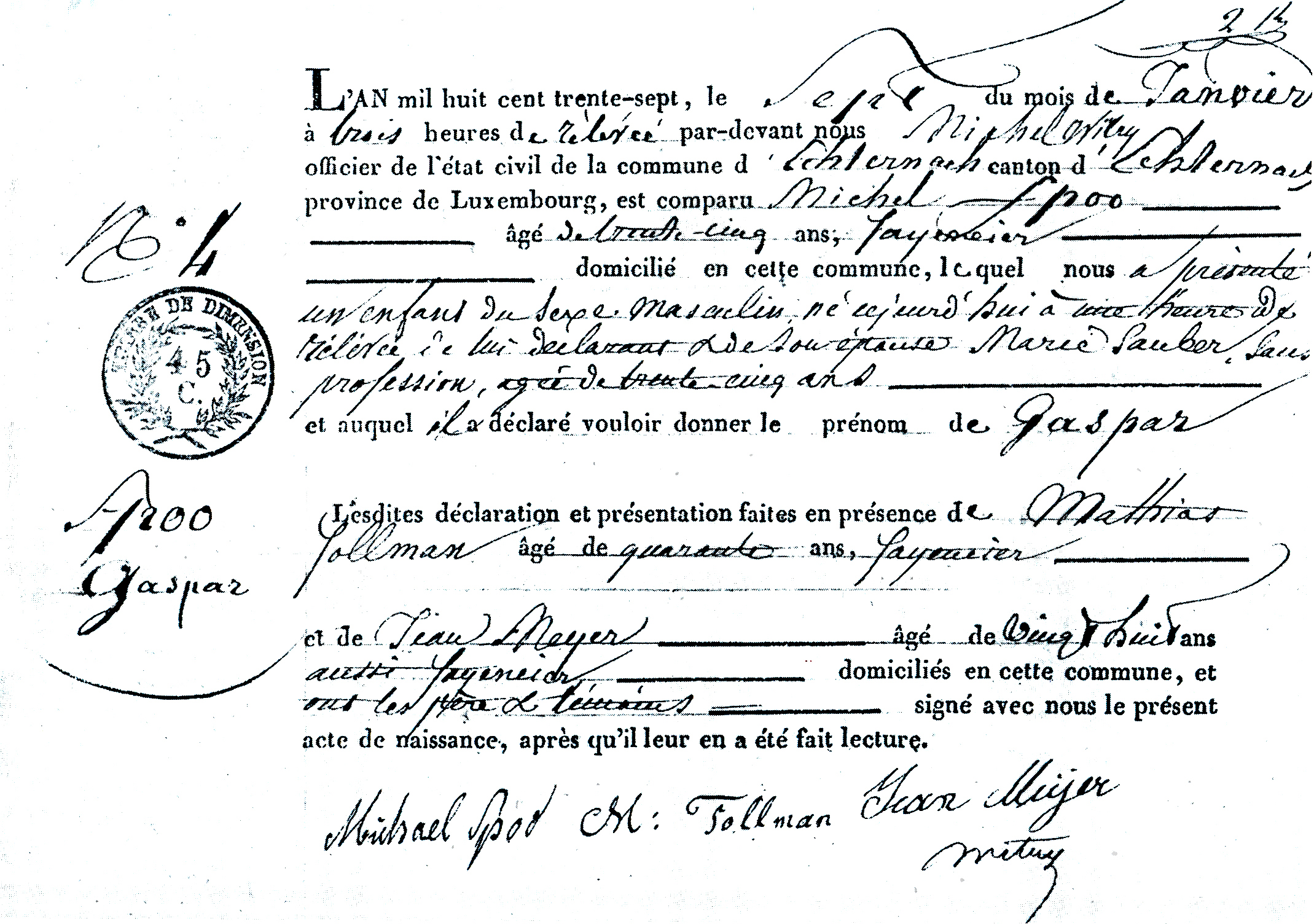 Acte de naissance de C. M. Spoo (1837-1914), Etat civil de la ville d'Echternach, registre des naissances 1837.